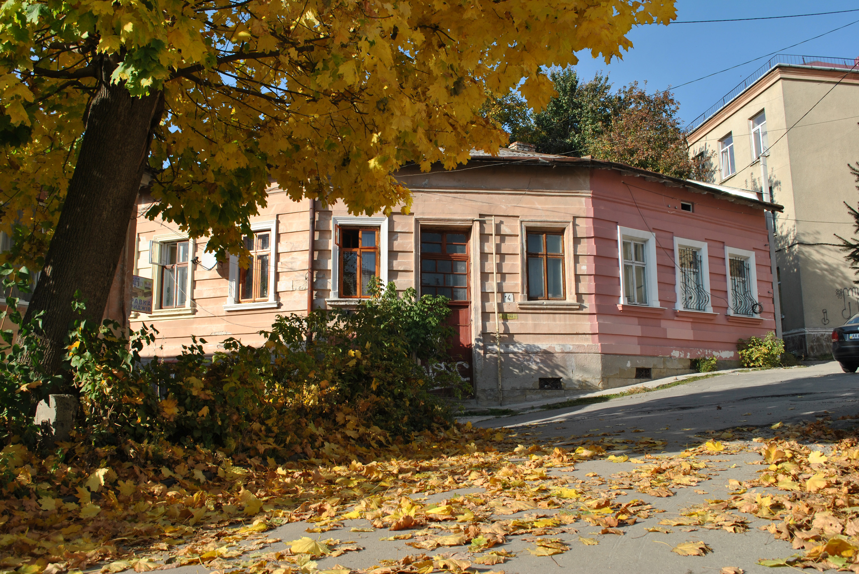 Житловий будинок XIX ст. (мур.) на вул. Доли, 4 в Тернополі. Осінні барви.